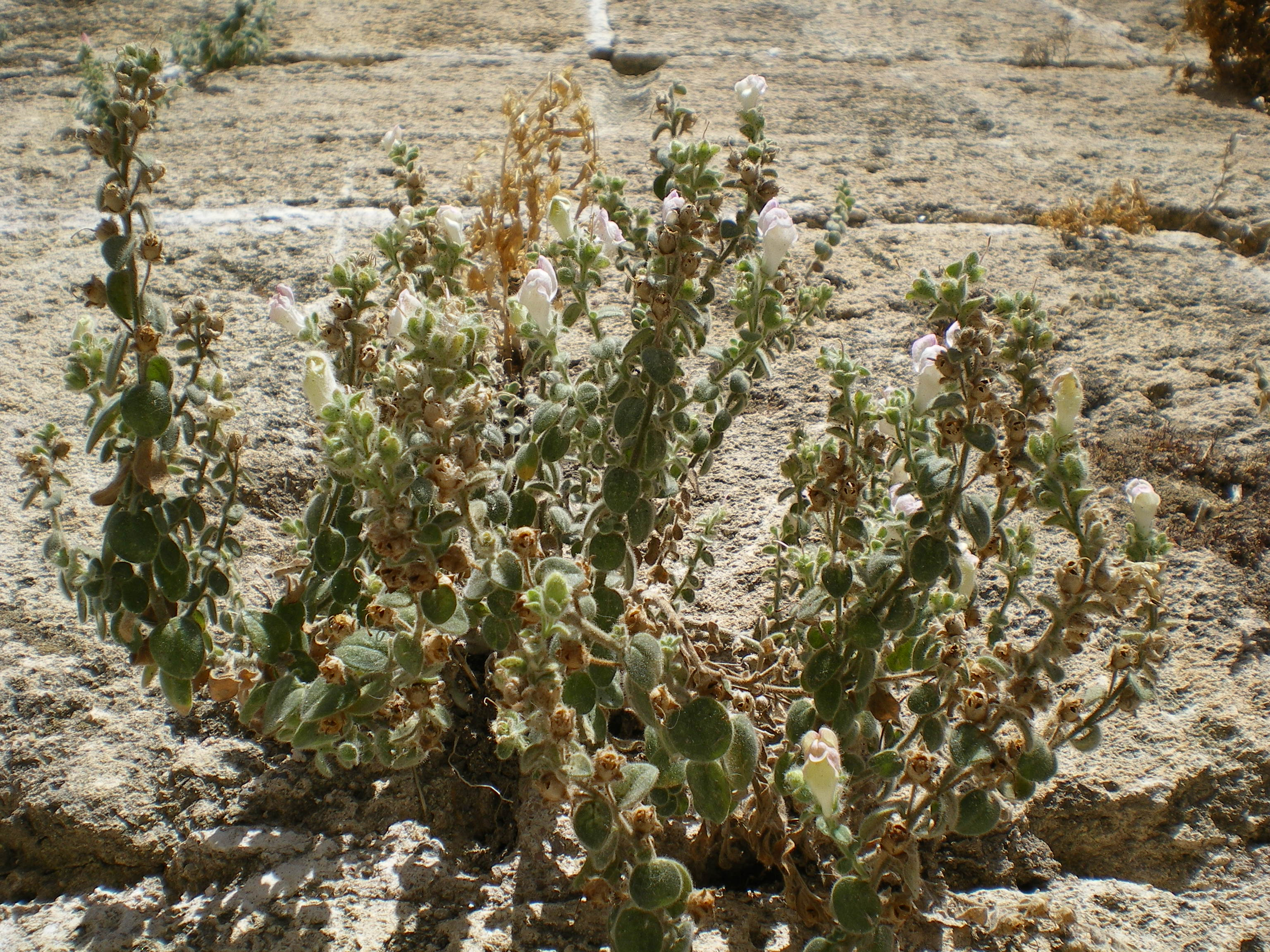 Fotografía de una vista general de mata de Antirrhinum hispanicum ssp. mollissimum, sobre la fachada de la Catedral de Almería, España.